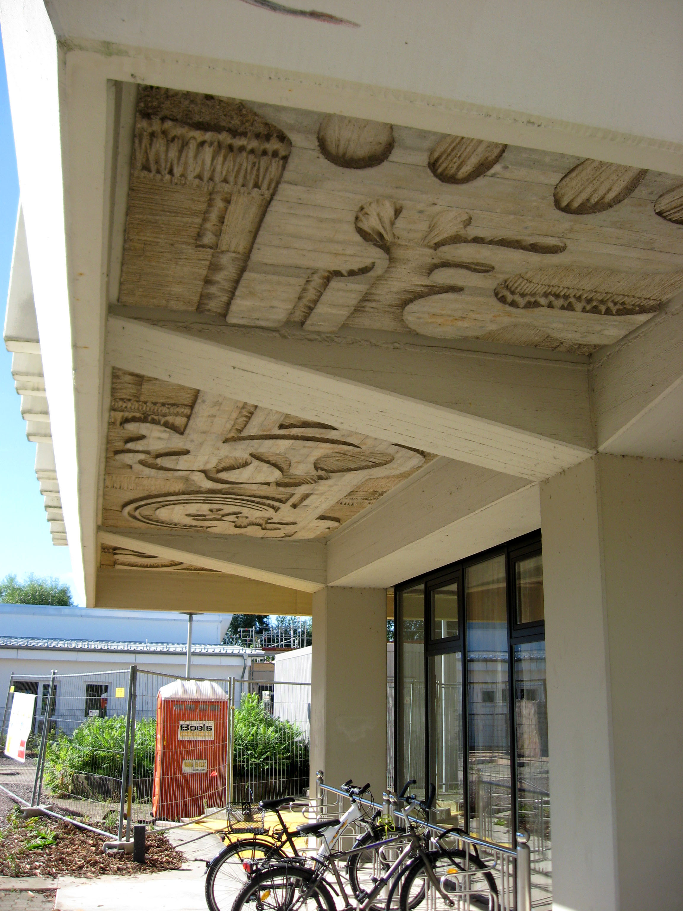 Detail am Rathaus der Verbandsgemeinde Offenbach/Queich: die Betonreliefs an der Unterseite des vorkragenden Obergeschosses sollen bei einem Abriss erhalten bleiben